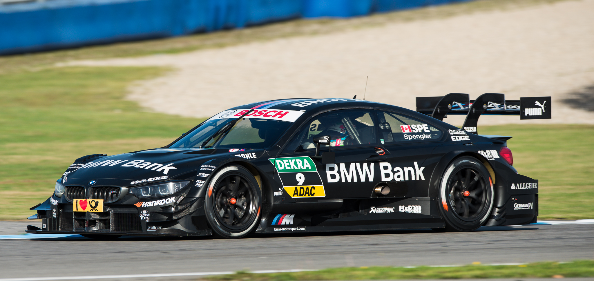 BMW Bank M4 DTM,Bruno Spengler,DTM,Deutsche Tourenwagen Masters,Hockenheimring,Motorsport,Schnitzer Motorsport GmbH